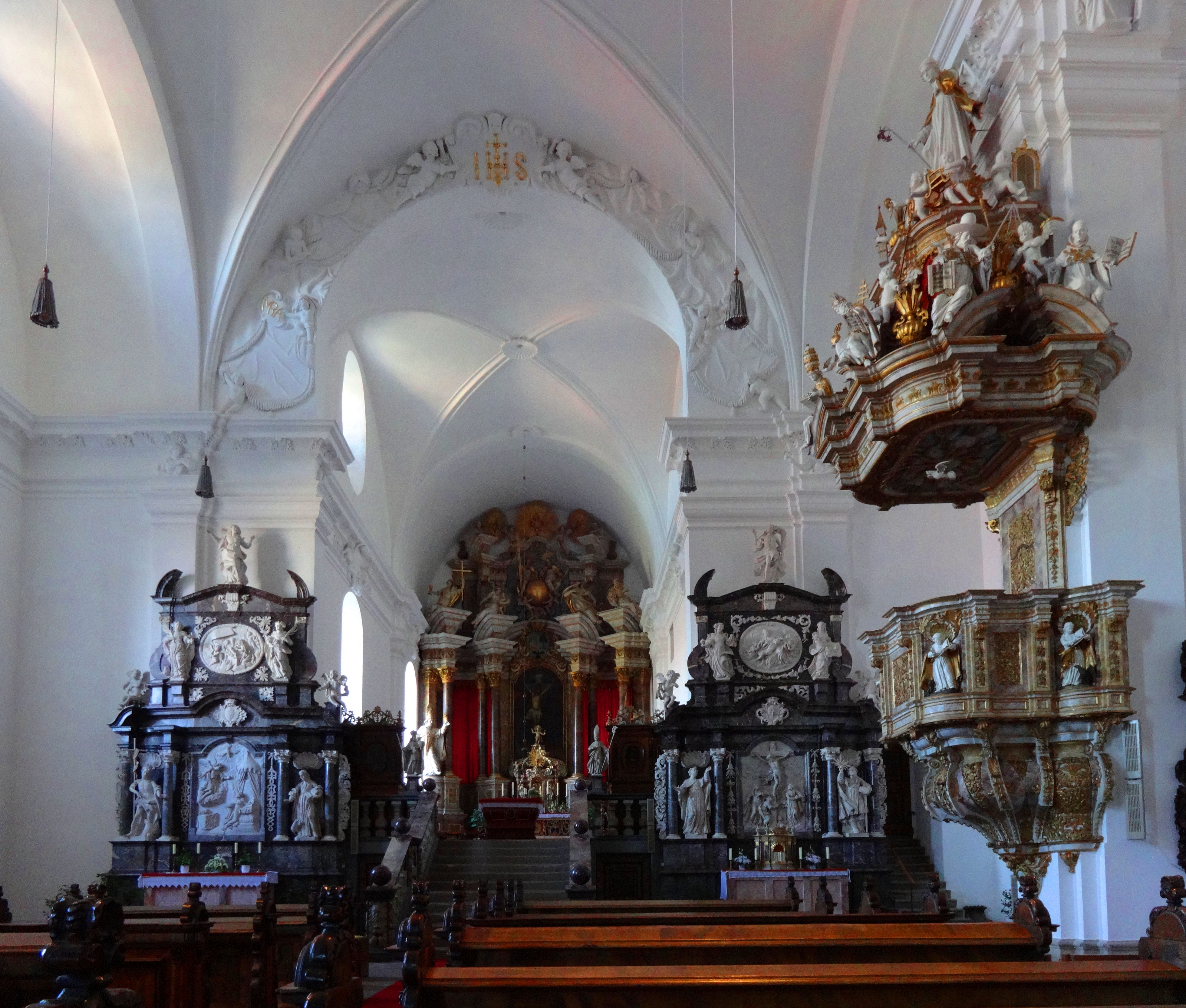 Goslar-Grauhof, Stiftskirche St. Georg, Inneres nach Osten